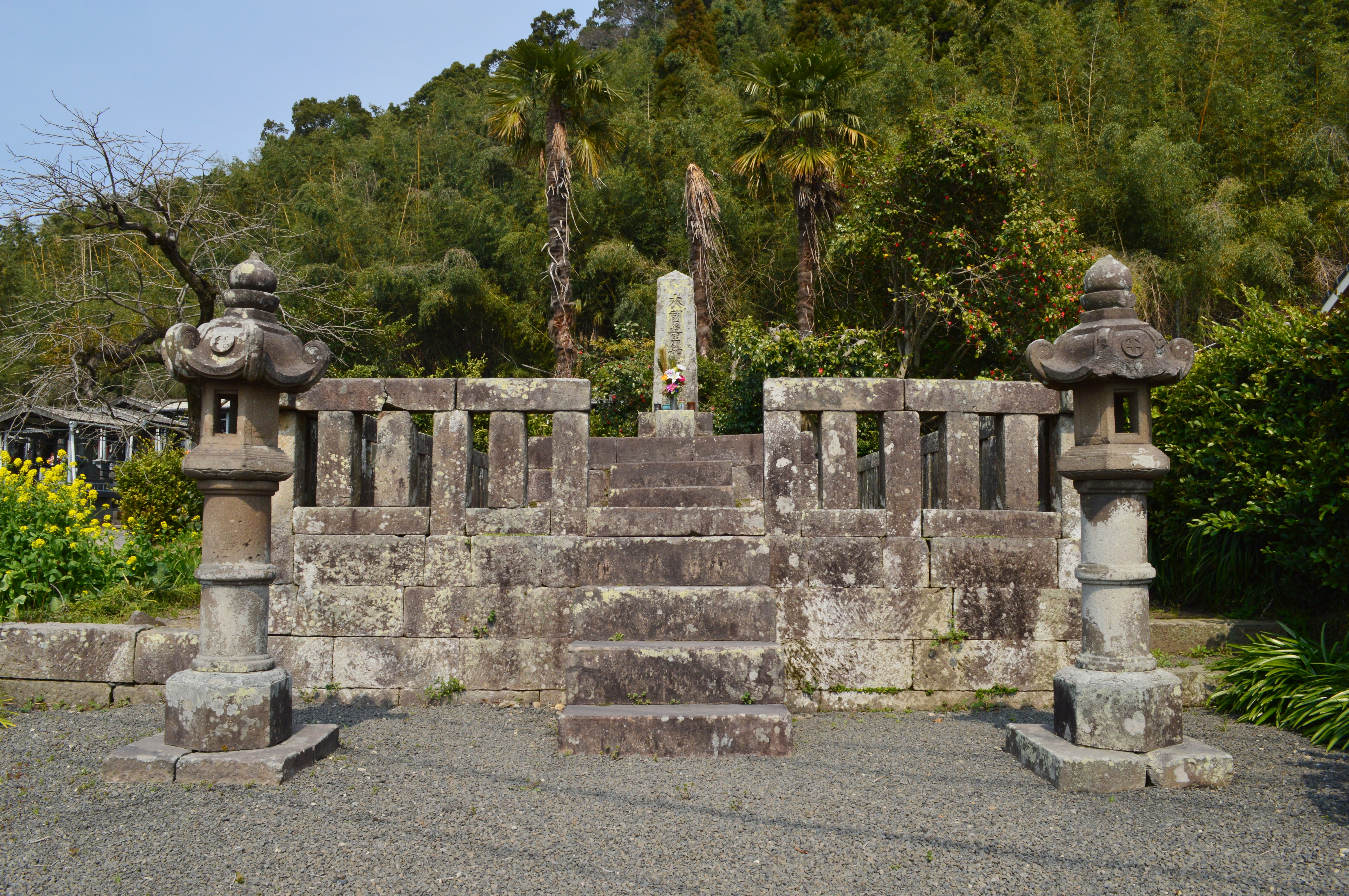 島津義久の墓 (徳持庵跡)